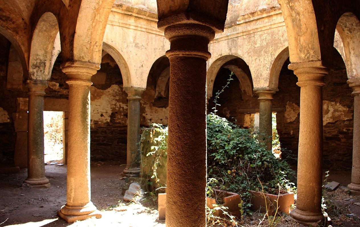 Claustro del Monasterio de San Isidoro de Lariana (Mérida)